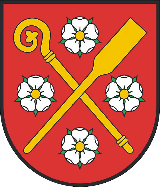 Herb gminy Nowodwór.